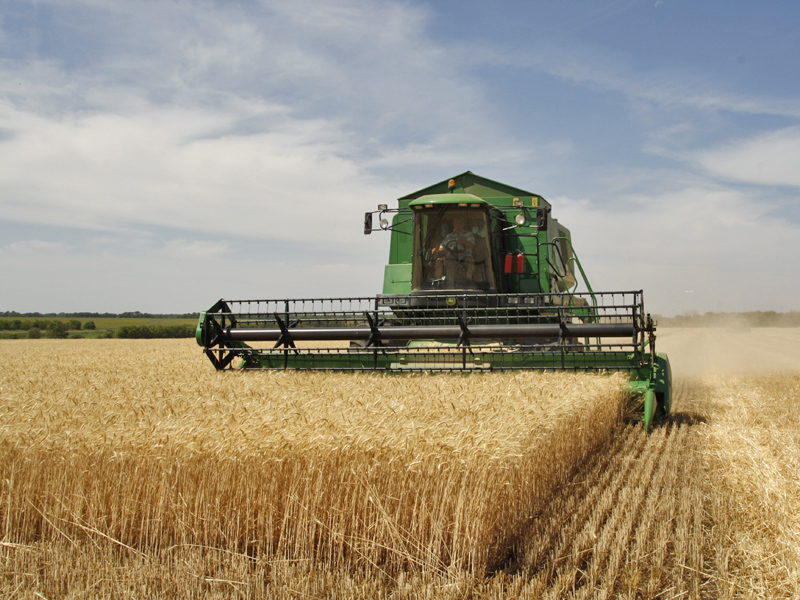 Уборка урожая в Волгоградской области.